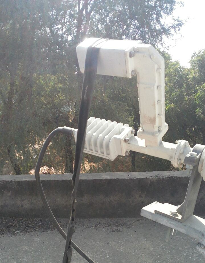 FEED HORN